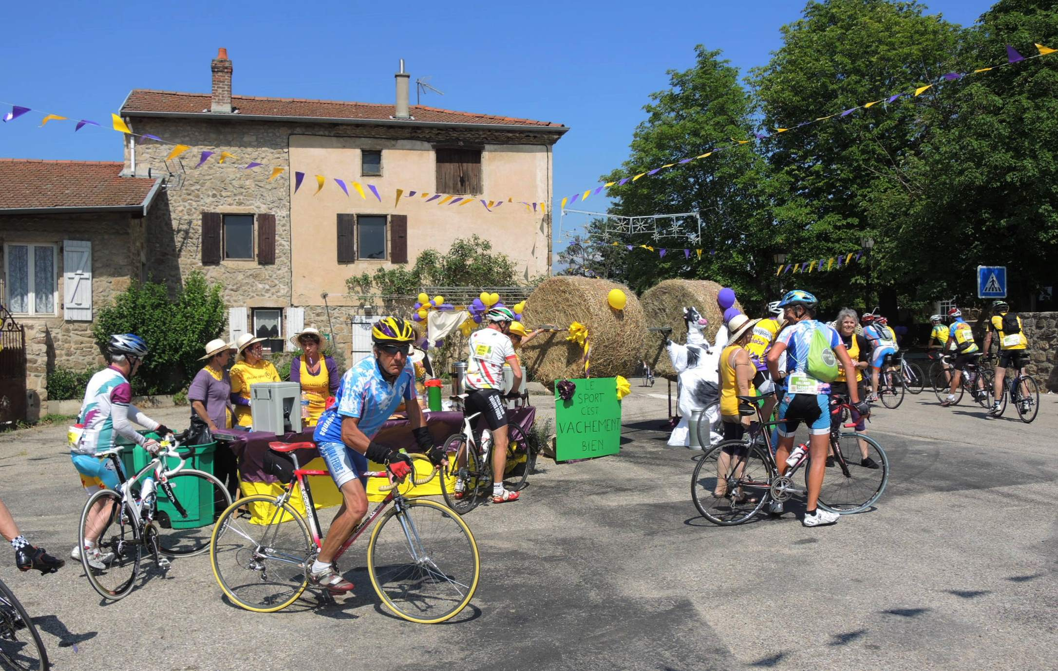 Colombier-le-Cardinal détail